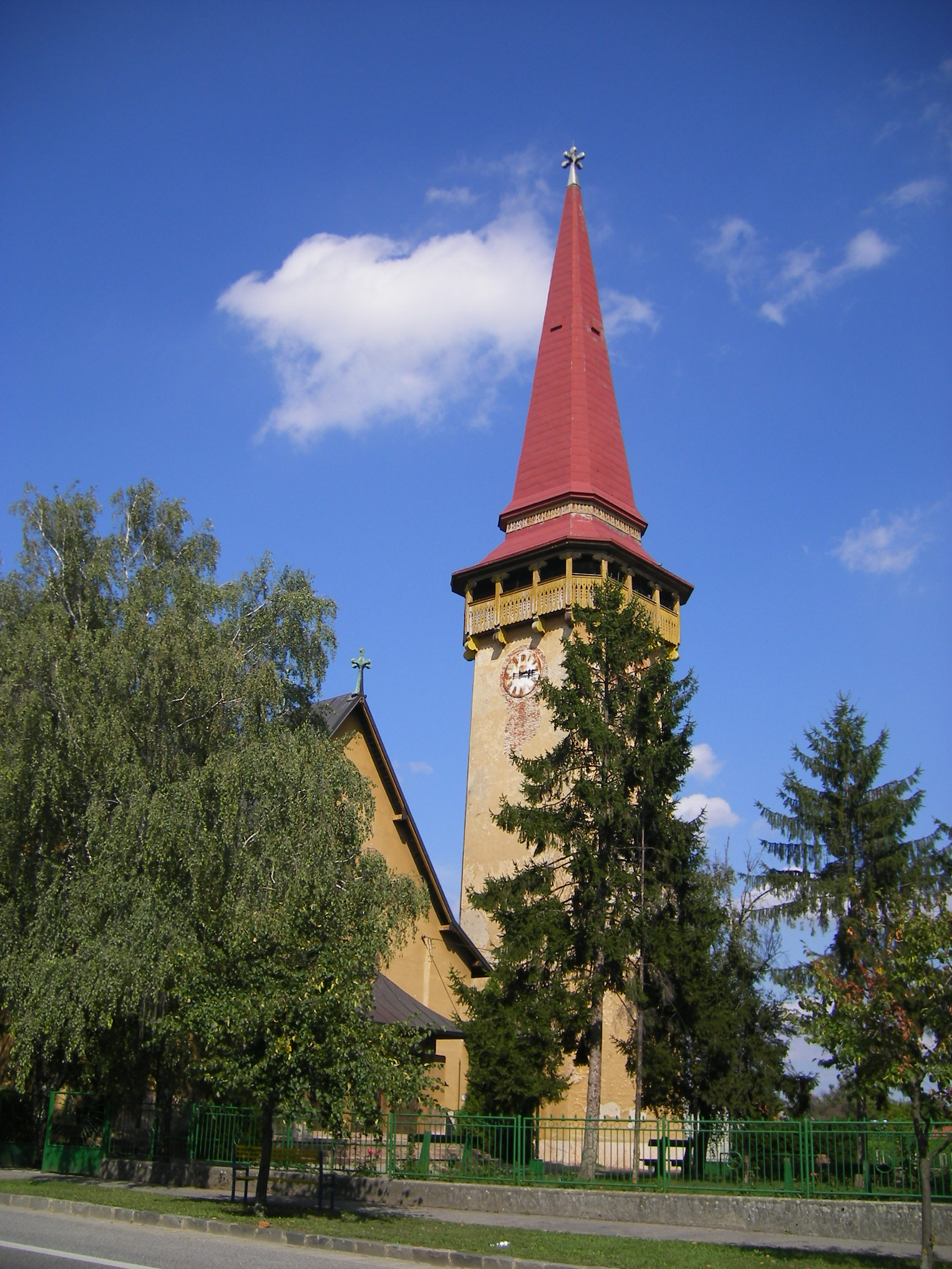 Hurbanovo-Ógyalla, Katolícky kostol